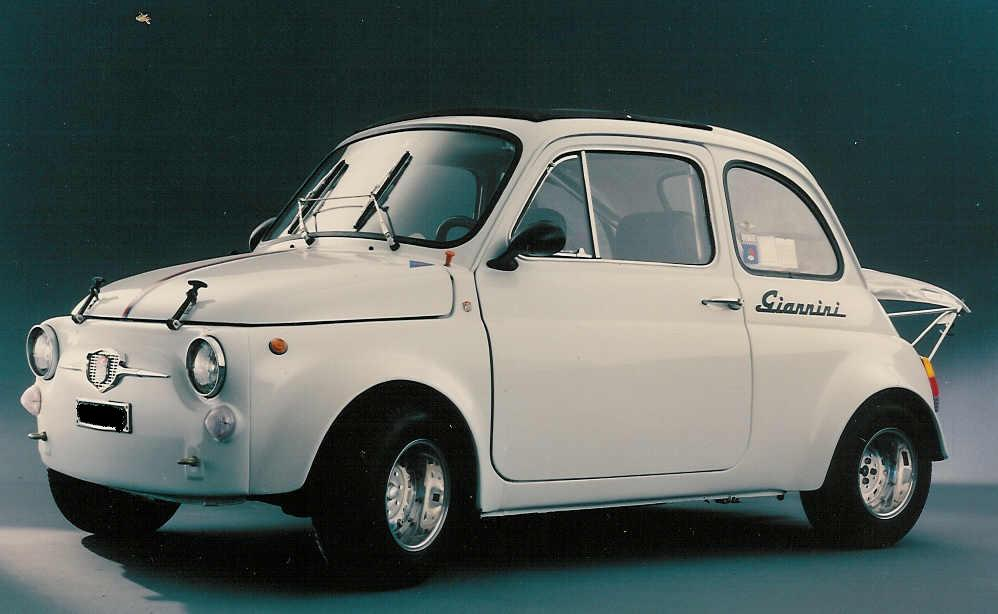 Immagine gentilmente donata dal Dottor Gabriele Polverelli-Giannini Automobili S.p.A. OTRS tkt #2006011610004435